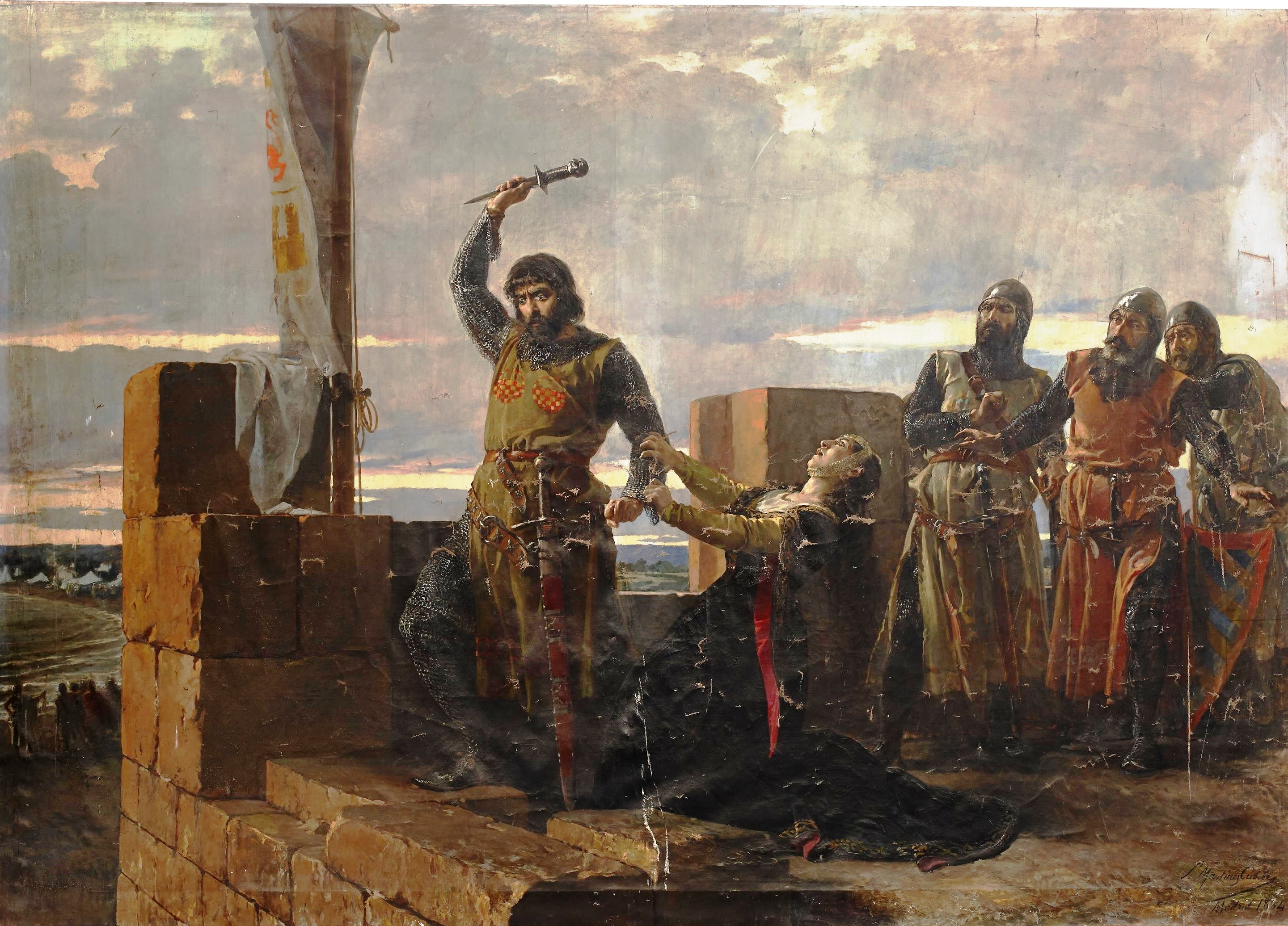 La obra representa a Guzmán el Bueno, el célebre defensor de la ciudad de Tarifa, arrojando su propio puñal para que los sitiadores de dicha ciudad dieran muerte con él a su propio hijo, motivo por el cual fue recompesado por el rey Sancho IV de Castilla con numerosas mercedes.